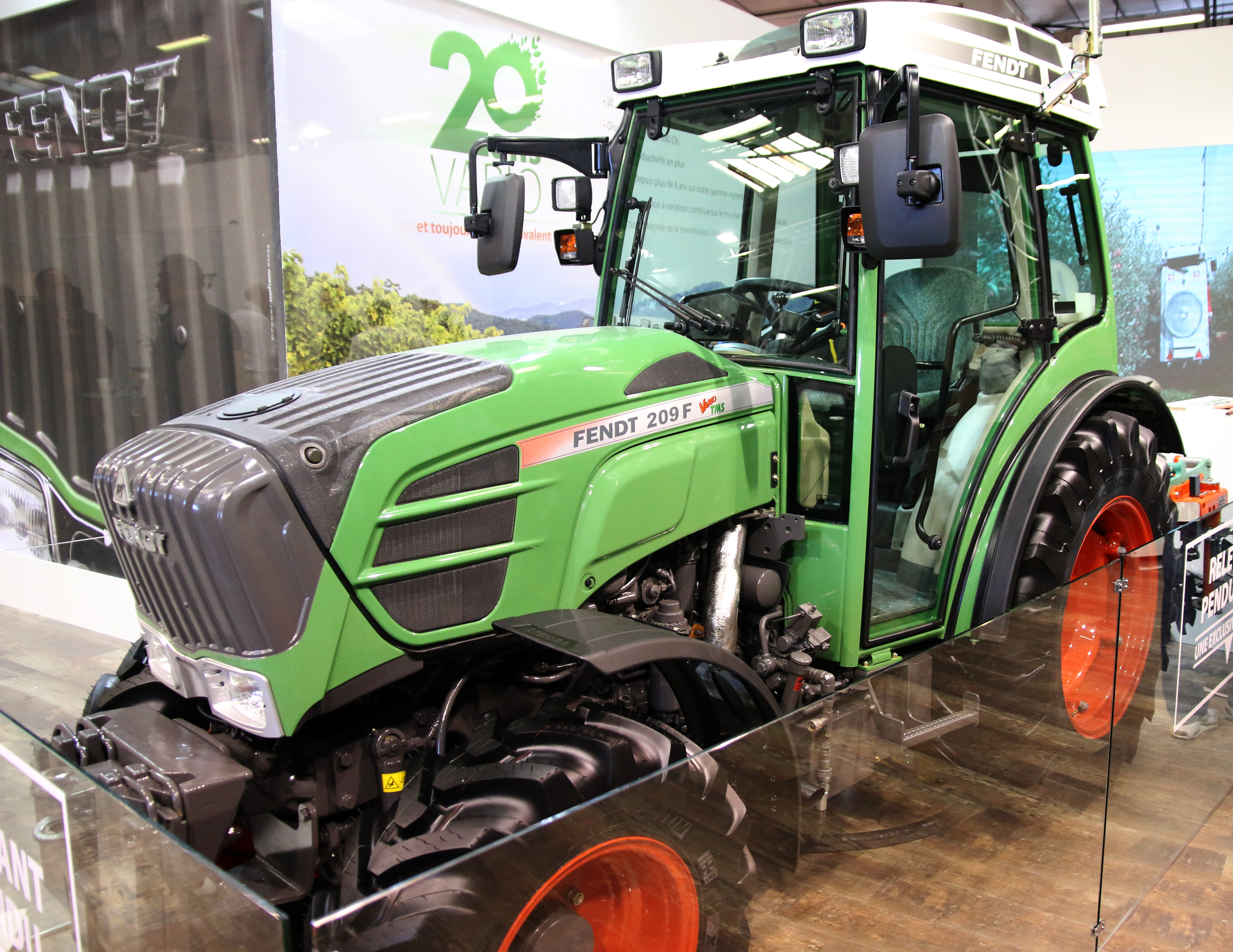 Tracteur vigneron Fendt 209 F